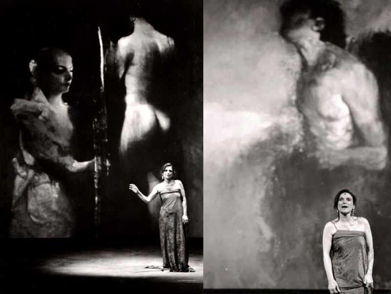 Scenografia a cura di Alessandro Kokocinski